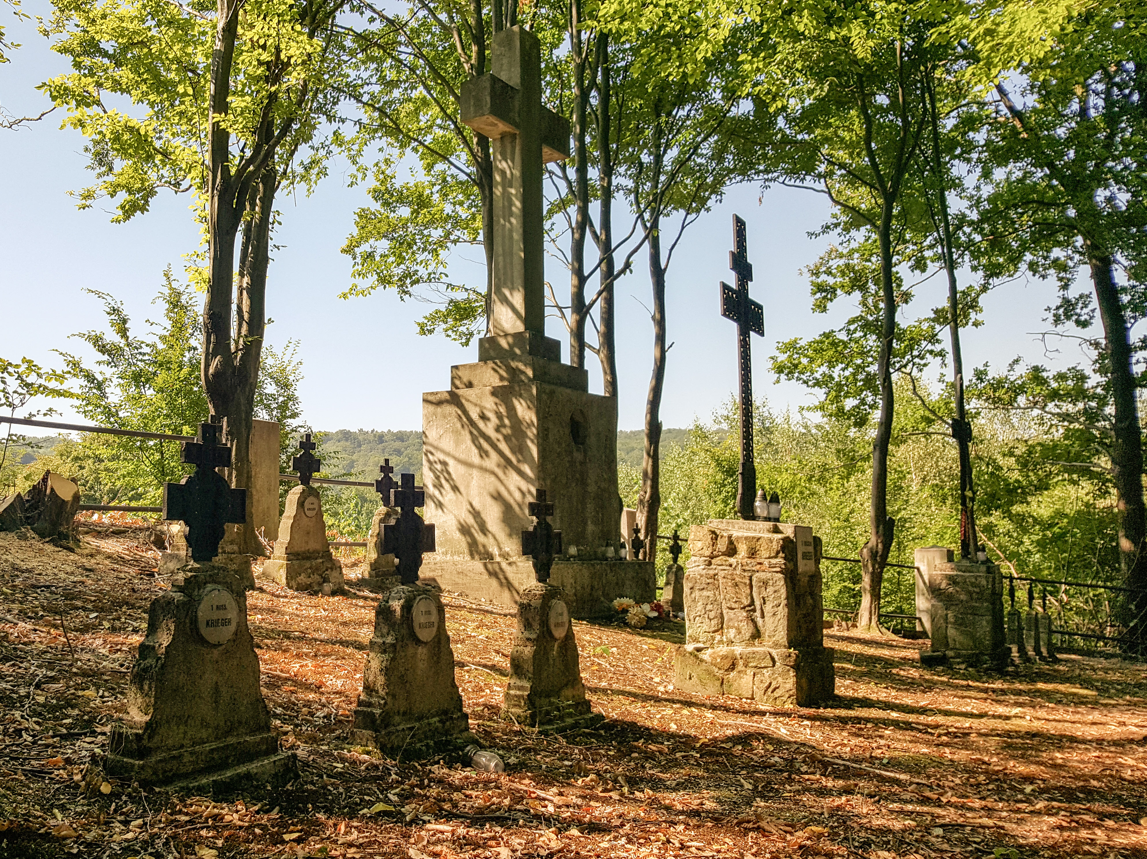 Cmentarz wojenny nr 170 z okresu I wojny światowej w Łowczowie